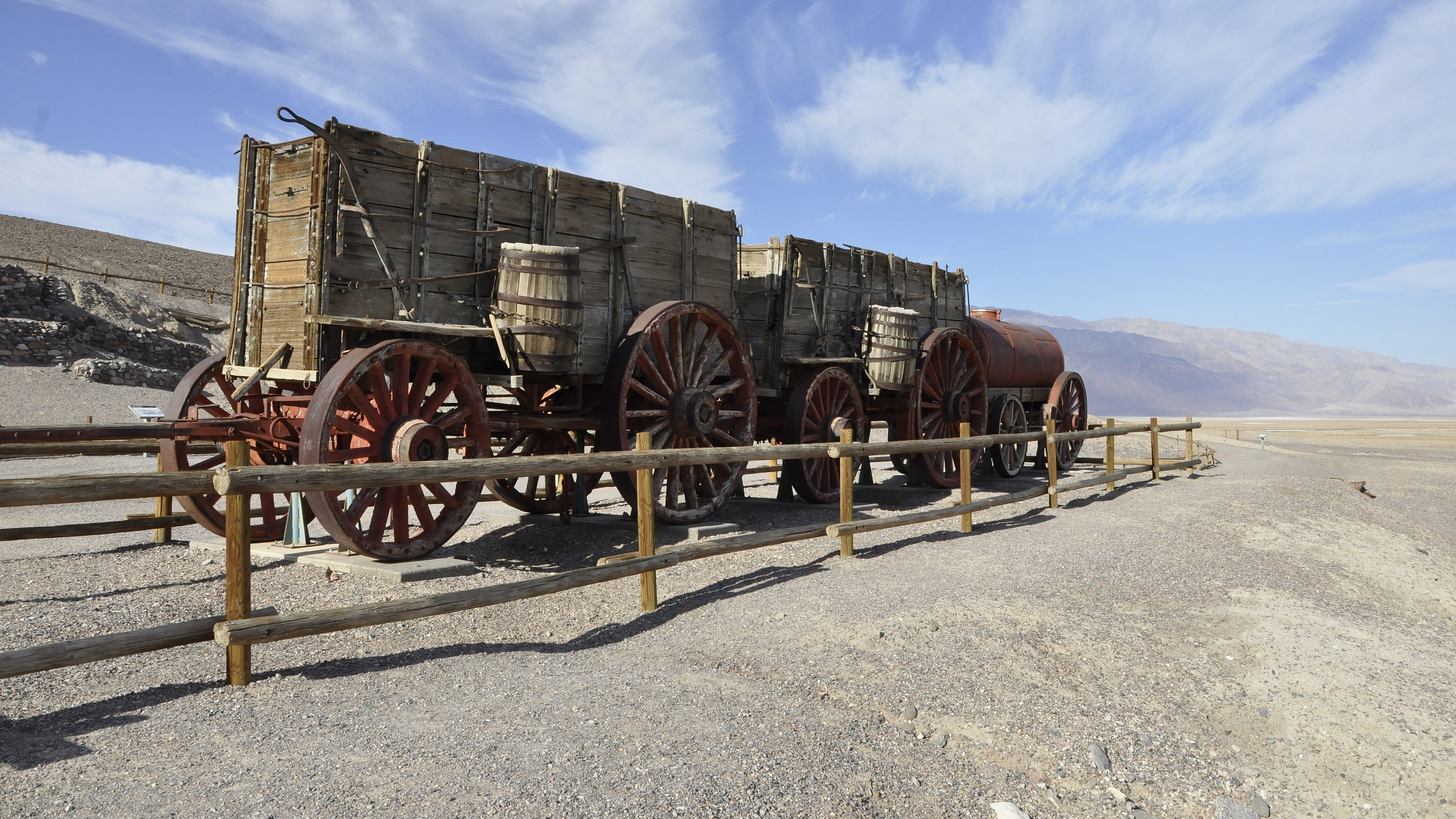 Karren en watercontainer van het Twenty Mule Team, Harmony Borax Works, Furnace Creek, Death Valley, USA